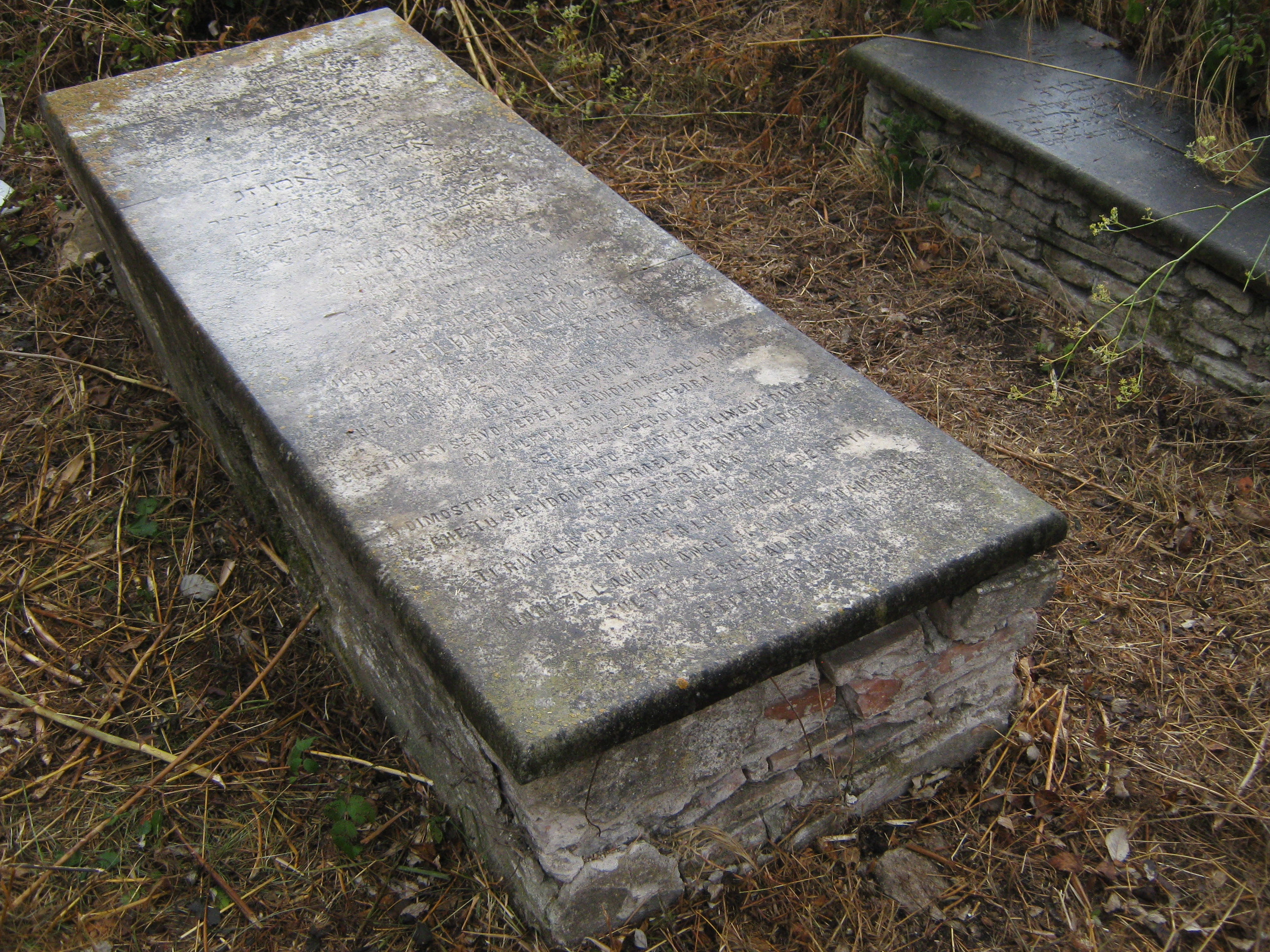 Livorno: cimitero ebraico di Viale Ippolito Nievo: tomba di Elia Benamozegh